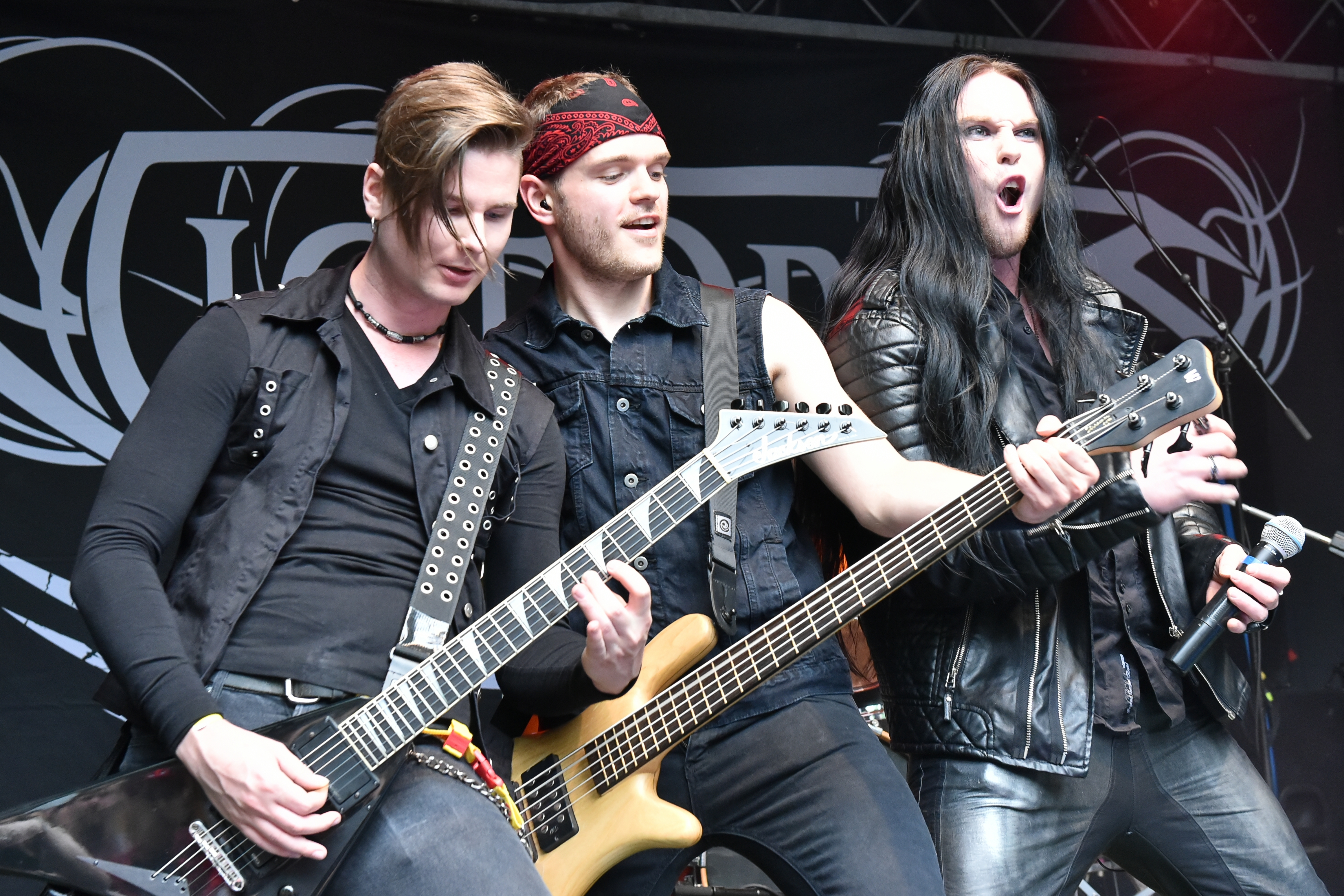 Victorius bei Rage Against Racism 2017 in Duisburg